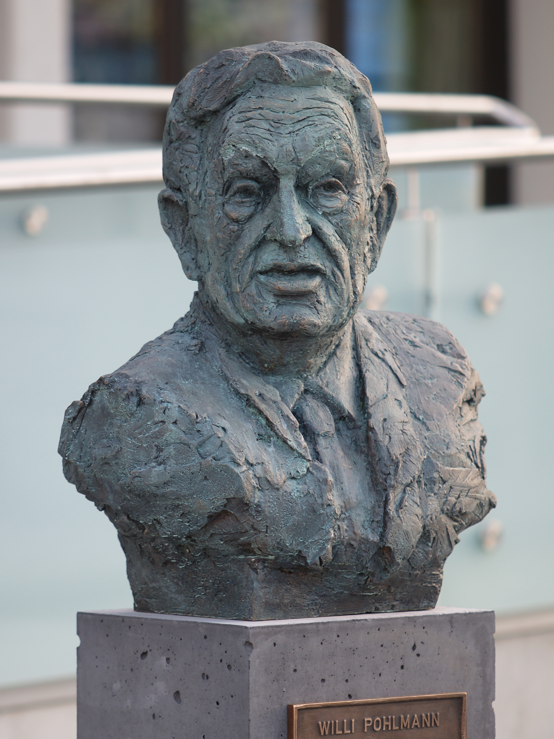 Bronze-Büste des ehemaligen Oberbürgermeisters von Herne (1984–1994), Willi Pohlmann, Künstler: Heinrich Brockmeier.